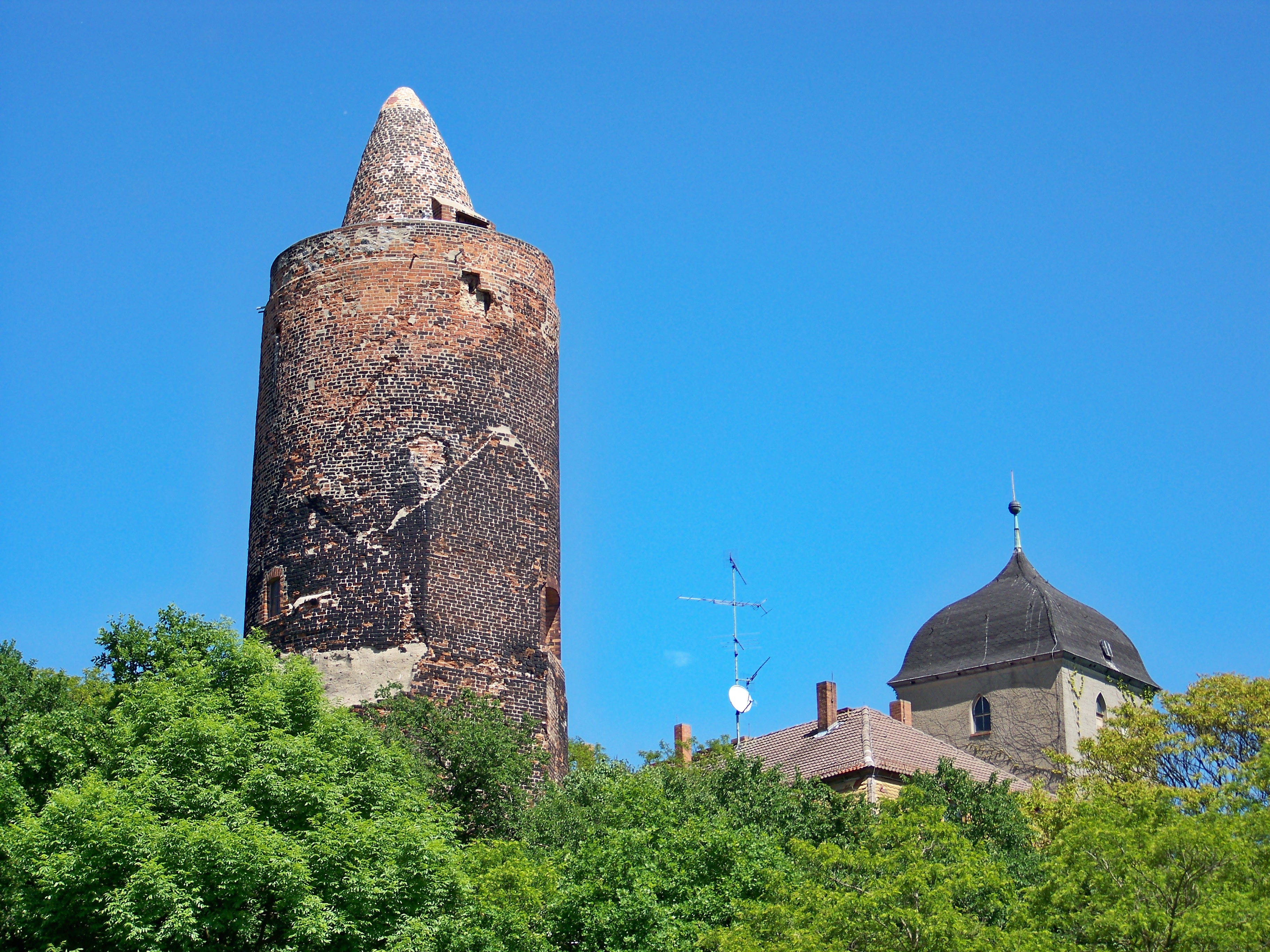 Schloss und Roter Turm in Pouch